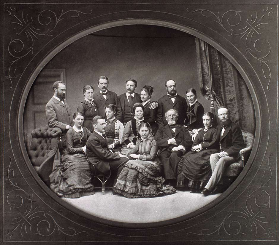 A Hasselblad család a XIX. század végén